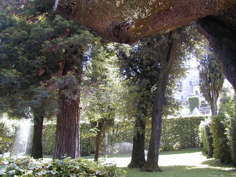 Tivoli, Villa d'Este, la Rotonda dei Cipressi